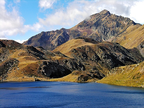 Pic de Font Blanca 2904 m, Pyrénées, frontière franco andorrane. Vu depuis l'étang Blaou, dans la vallée de Siguer